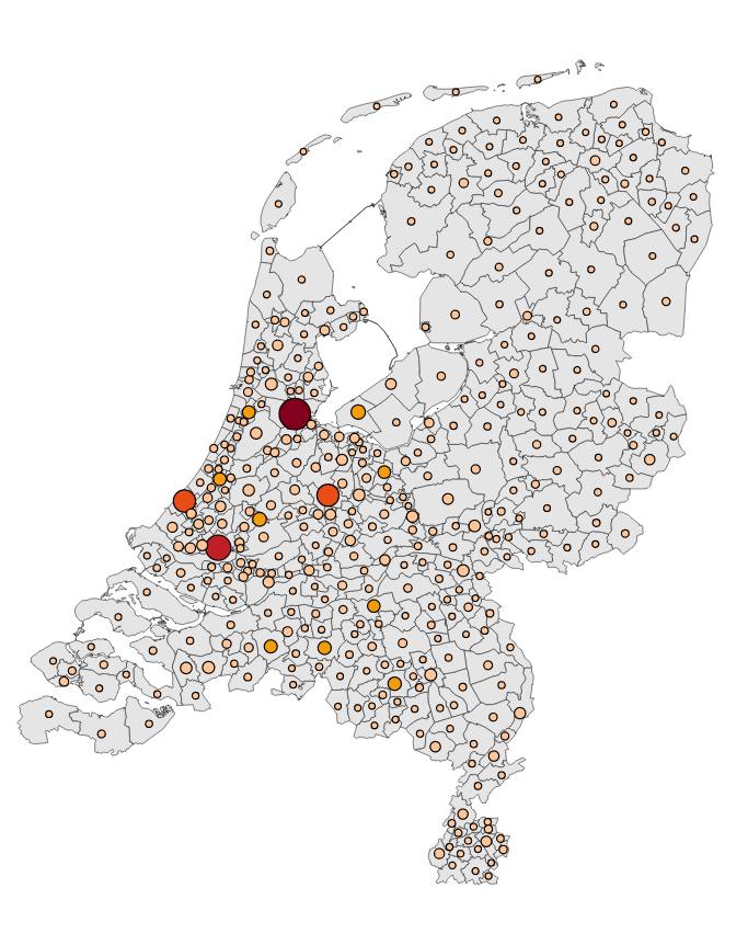 Aantal mensen met een Marokkaanse achtergrond in Nederland per gemeente